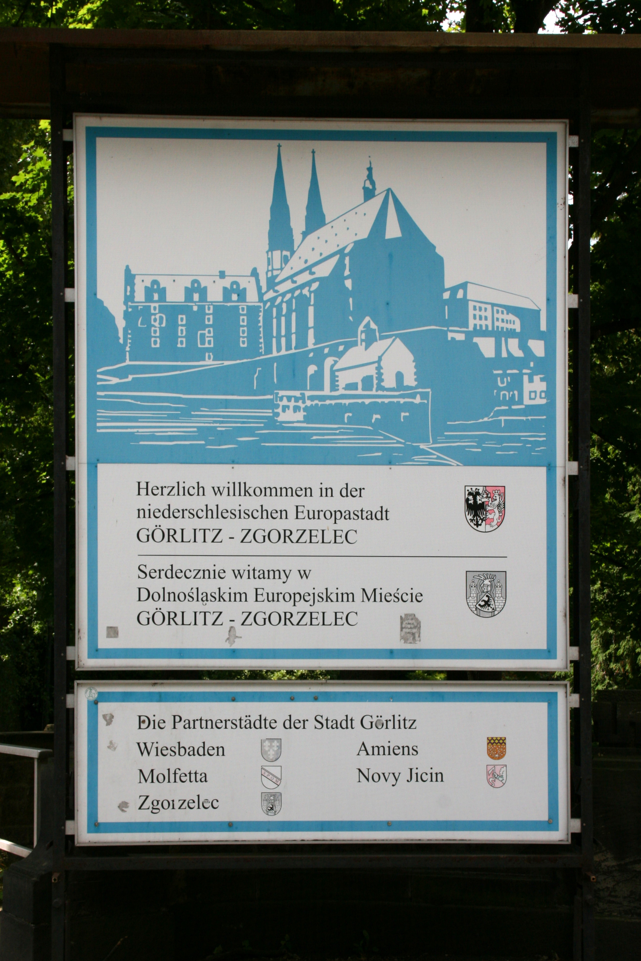 Am Stadtpark in Görlitz